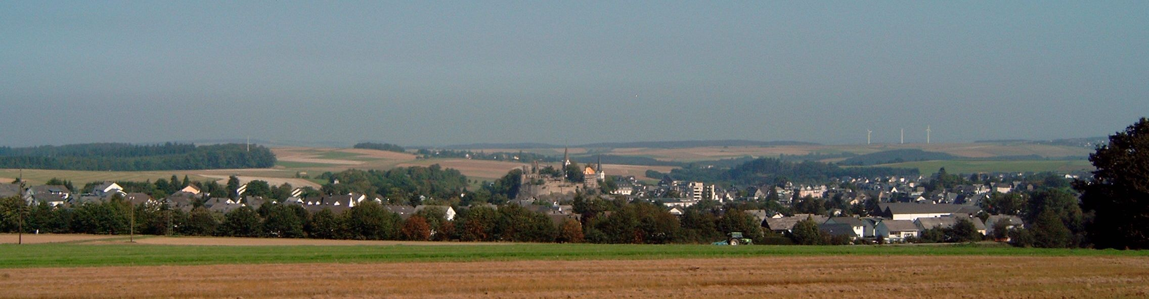 Ansicht der Stadt Kastellaun aus südlicher Richtung